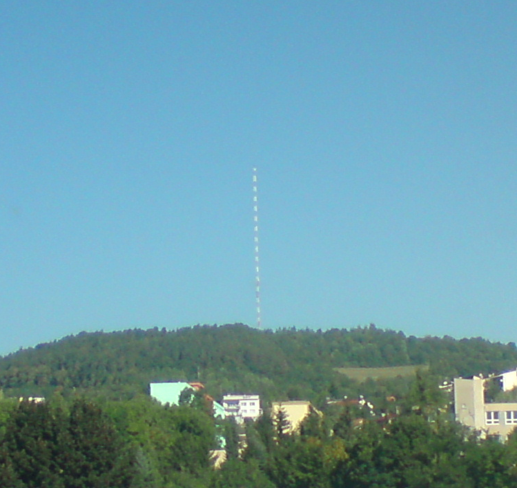 Vysielač Laskomer